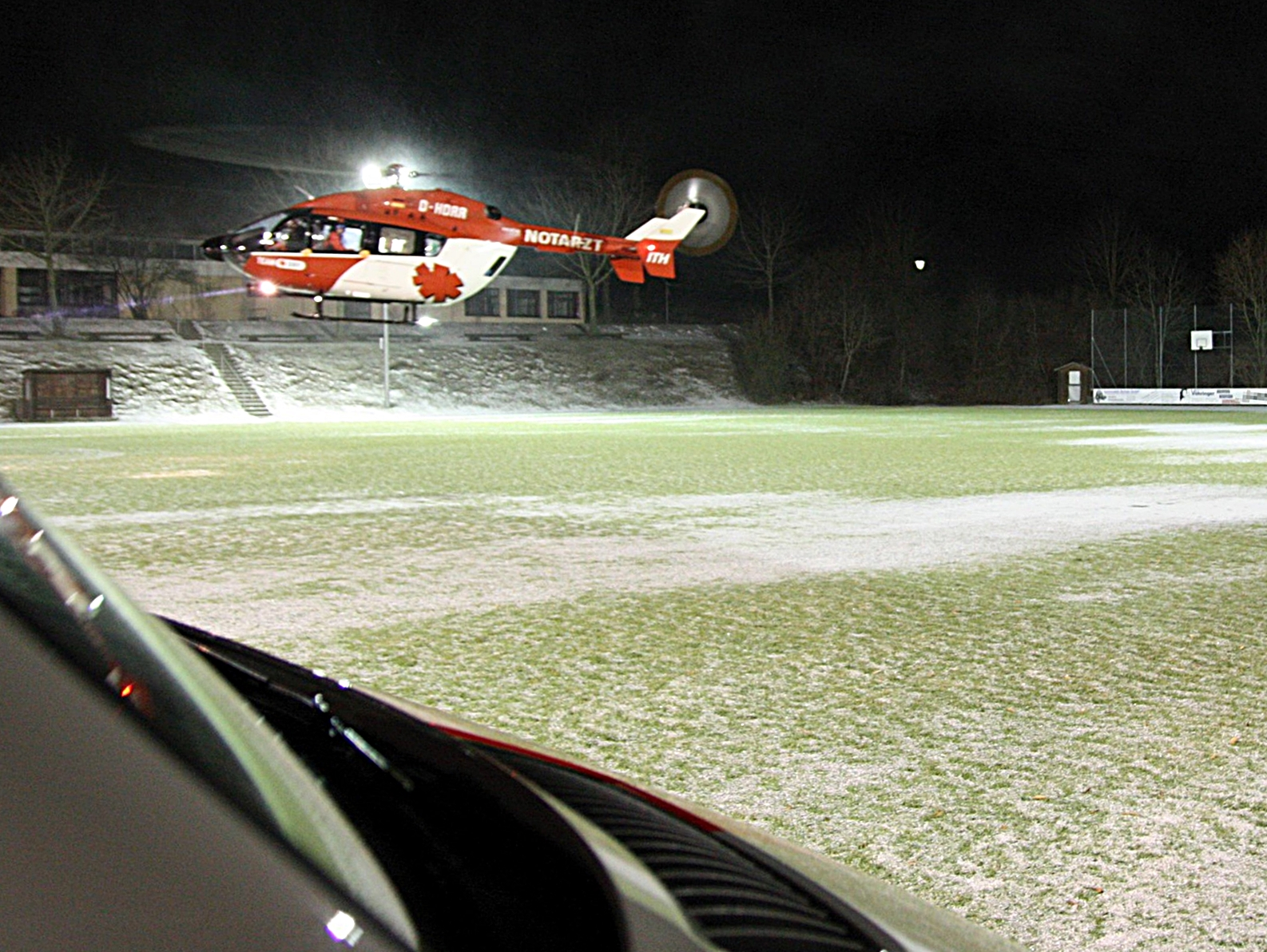 Christoph München: Nachtlandung auf einem Sportplatz, im Vordergrund NAW mit Patient